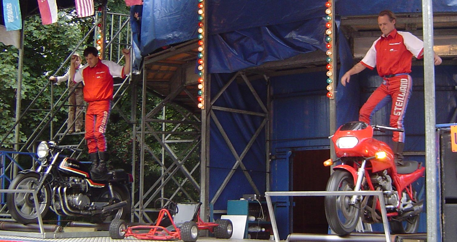 Motorcyklerne demonstreres uden for dødsdromen i et omrejsende tivoli i Weert).